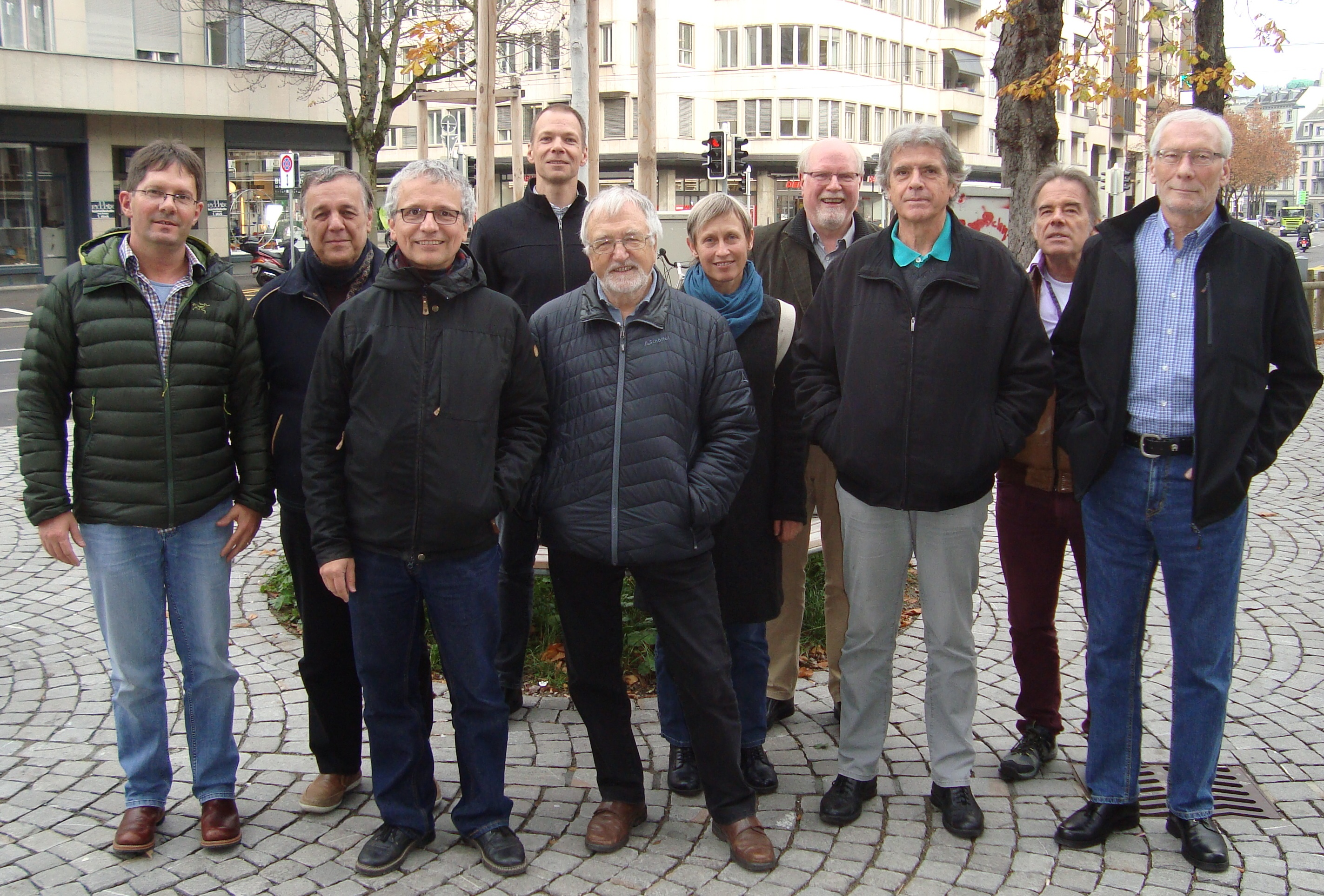 Präsidenten Schweizerische Informatikkonferenz, Arbeitsgruppe GIS (SIK-GIS)